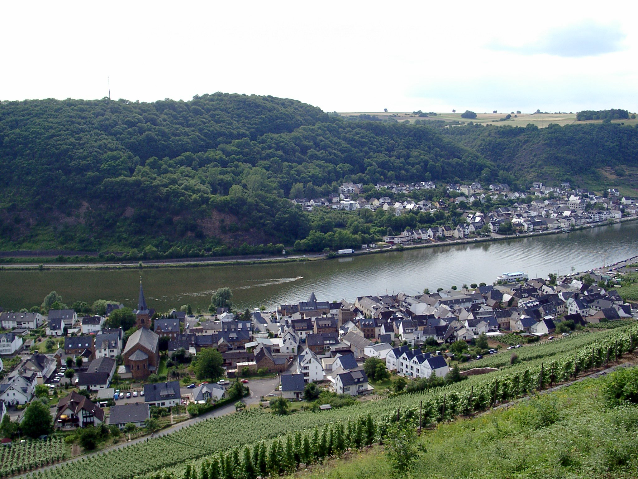 Alken von der Burg Thurant aus - selbst fotografiert (Klaus Graf) 3.7.2005